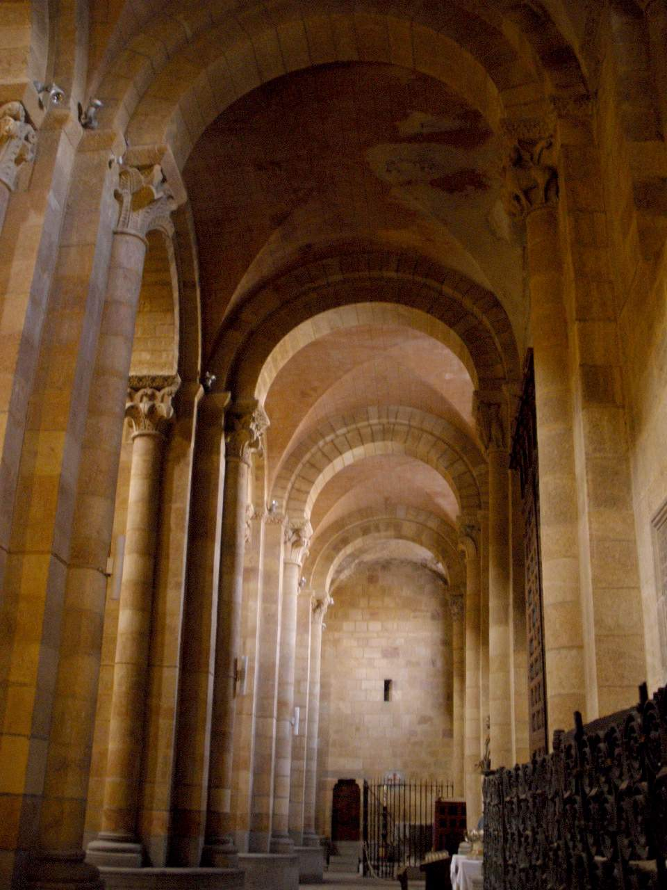 Basílica de San Vicente, Ávila. San Vicente, Ávila Native nameBasílica de los Santos Hermanos Mártires, Vicente, Sabina y Cristeta Basílica de San VicenteParent institutionOld Town of Ávila with its Extra-Muros Churches LocationAvilaCoordinates40° 39′ 28.9″ N, 4° 41′ 45.67″ W EstablishedMiddle Agesera QS:P2348,Q12554Authority control : Q2887123 VIAF: 154050773 LCCN: nr94009431 UNESCO: 348-003 BIC: RI-51-0000031-00000 JCyL: 355 WorldCat institution QS:P195,Q2887123